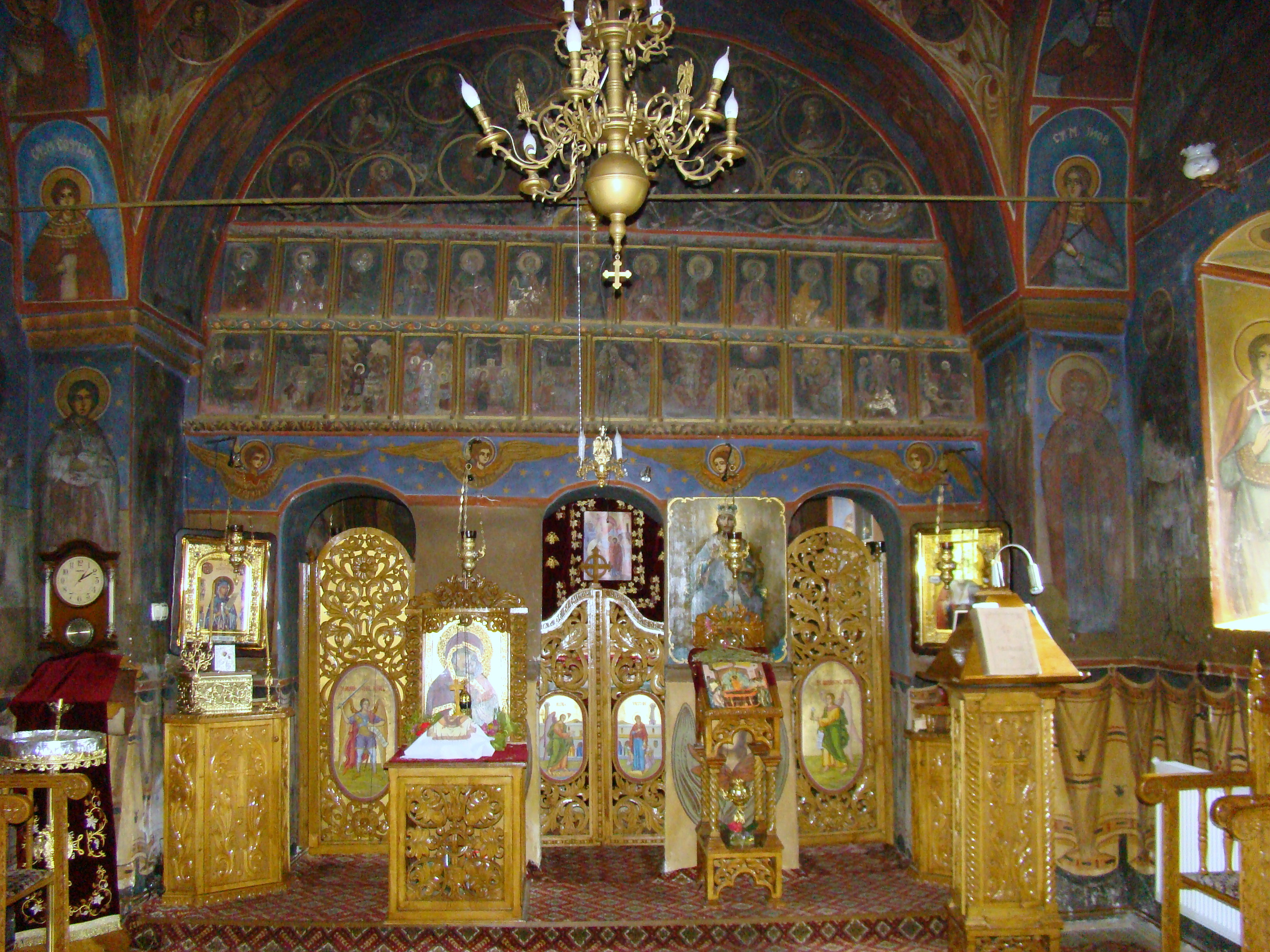 Biserica "Intrarea în Biserică"-Brad-Bătușari, municipiul Curtea de Argeș, Str. Vlaicu Vodă 8